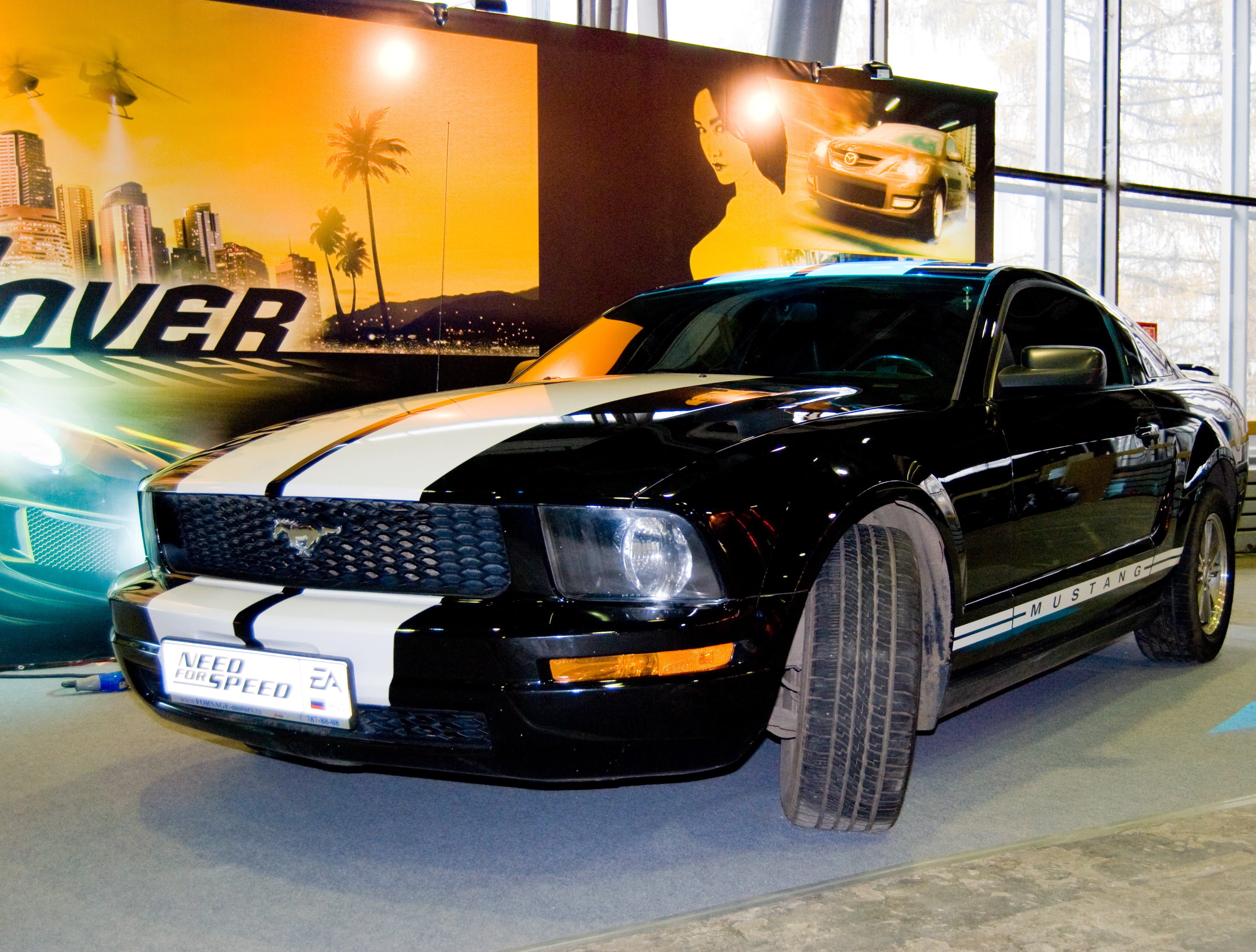 Igromir 2008